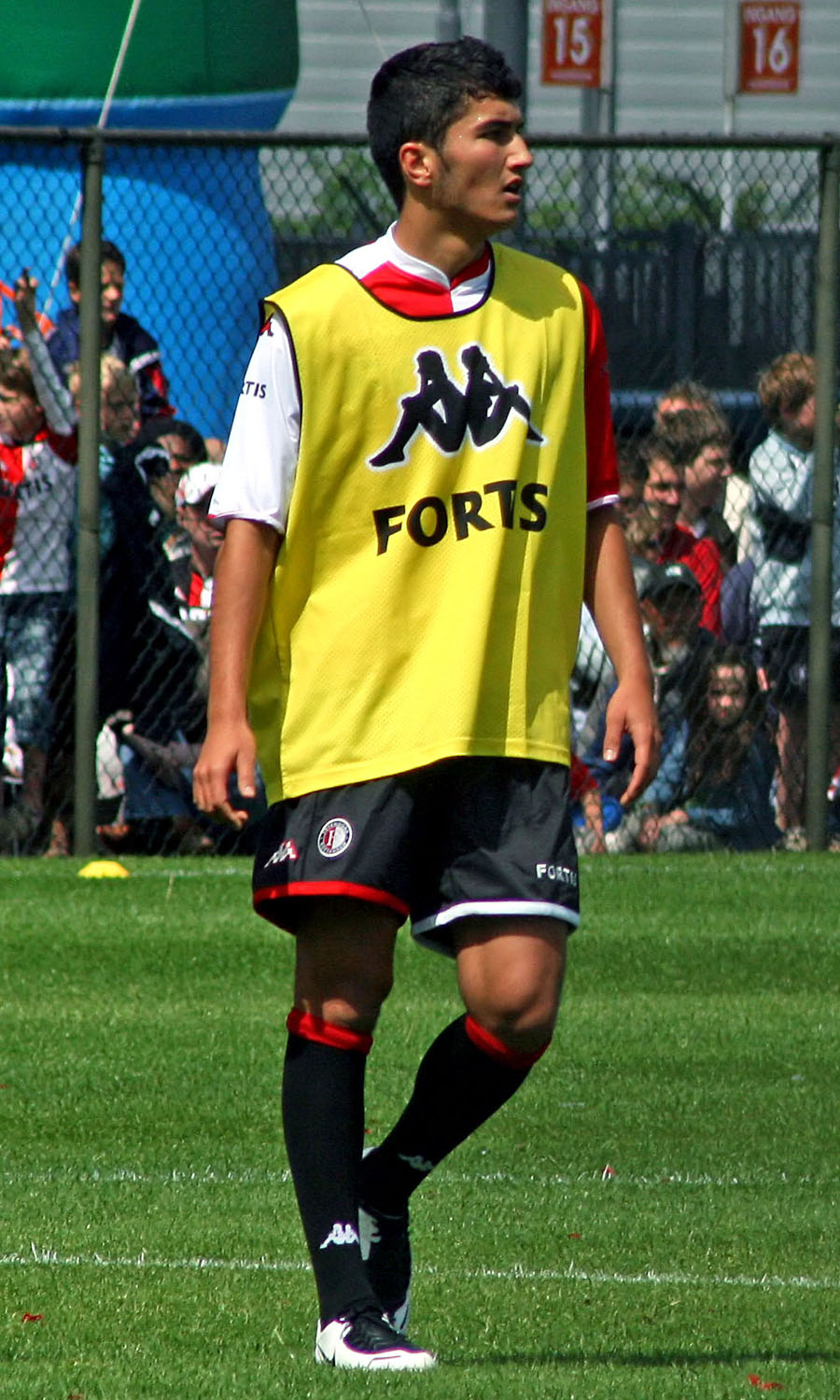 Nuri Sahin (Feyenoord)